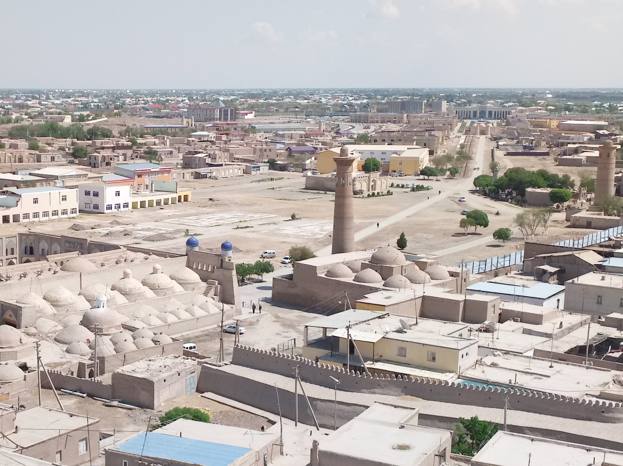 Komplex Said Scheliker Bei mit Moschee, Medrese und Minarett vor der Altstadt Chiwas